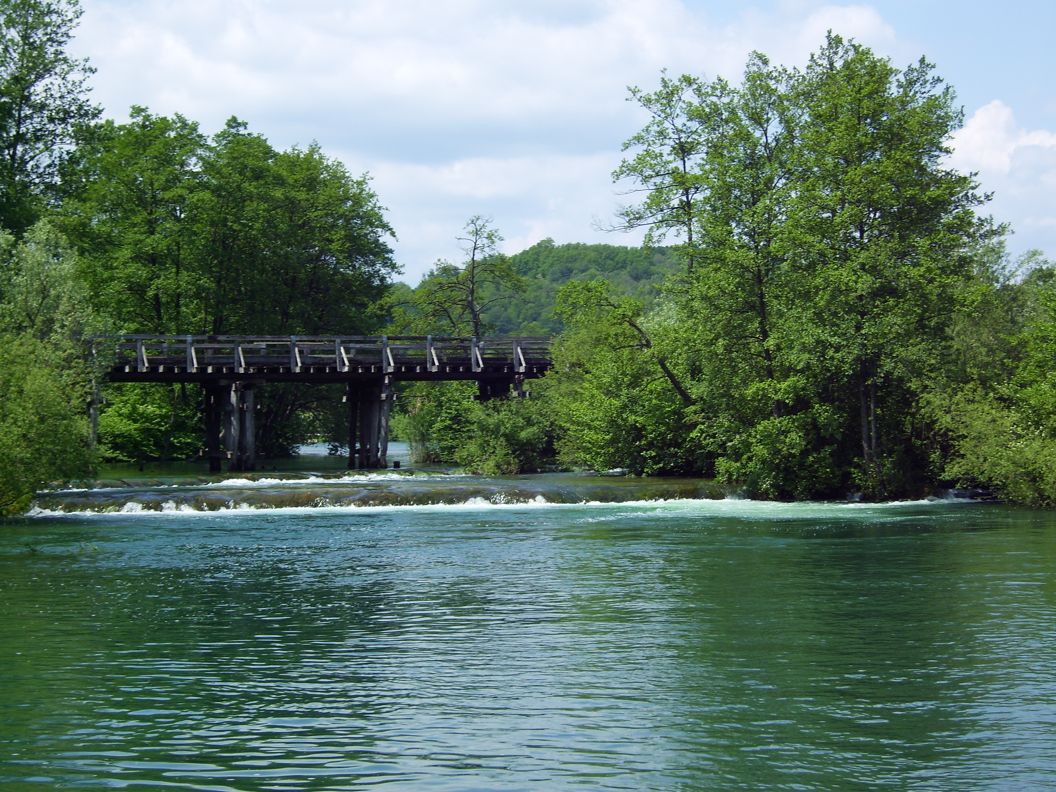 Mrežnica - super zum baden